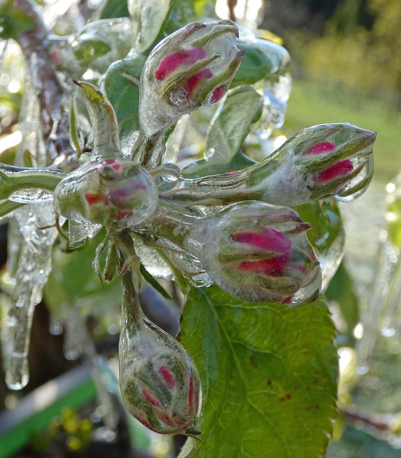 Eisumhüllte Apfelblüte nach Frostschutzberegnung